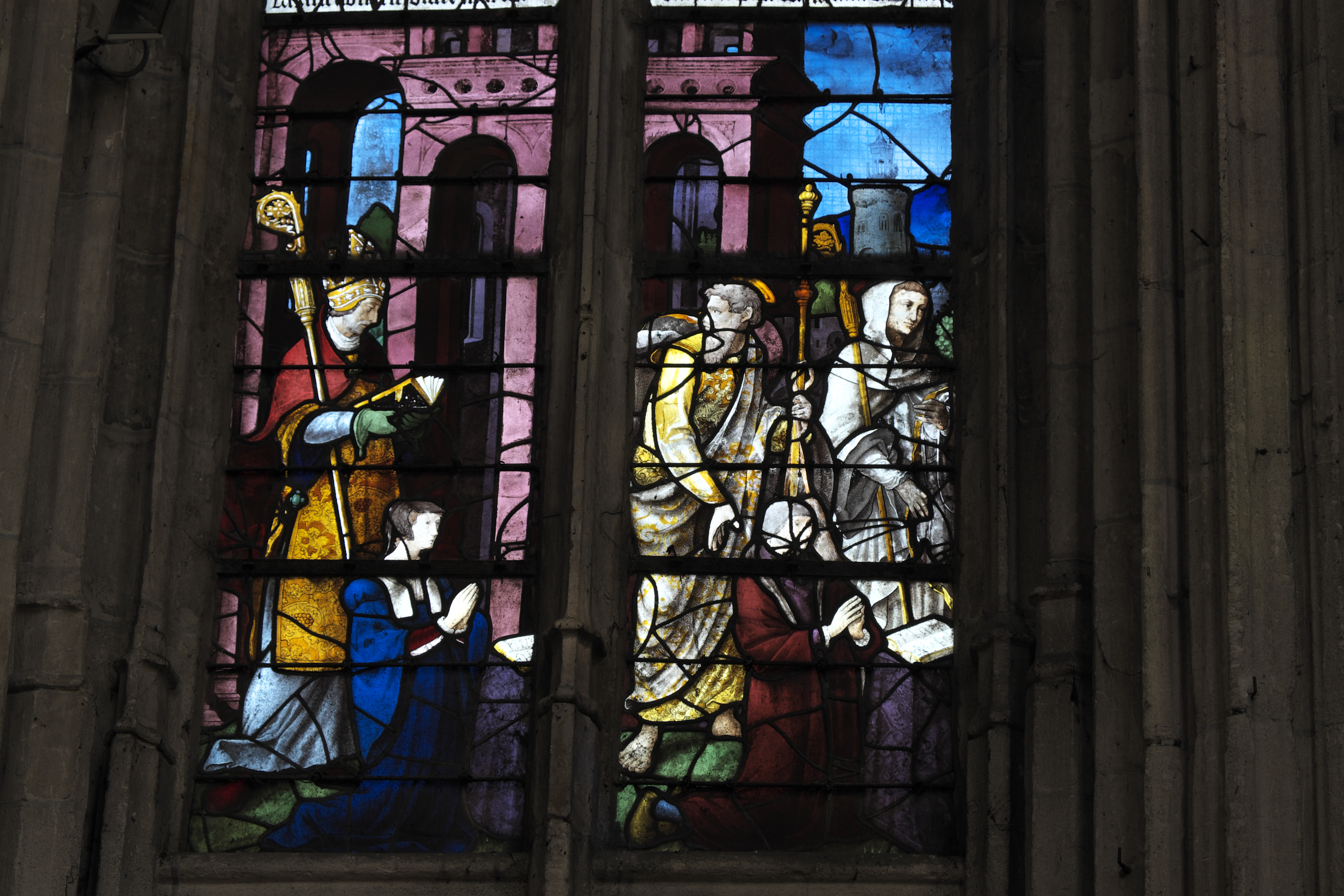 Katholische Kirche Sainte-Foy in Conches-en-Ouche im Département Eure (Haute-Normandie/Frankreich), Bleiglasfenster aus der 1. Hälfte des 16. Jahrhunderts im Chor; Darstellung: Martyrium der hl. Fides von Agen, unten: Stifter (Ausschnitt)